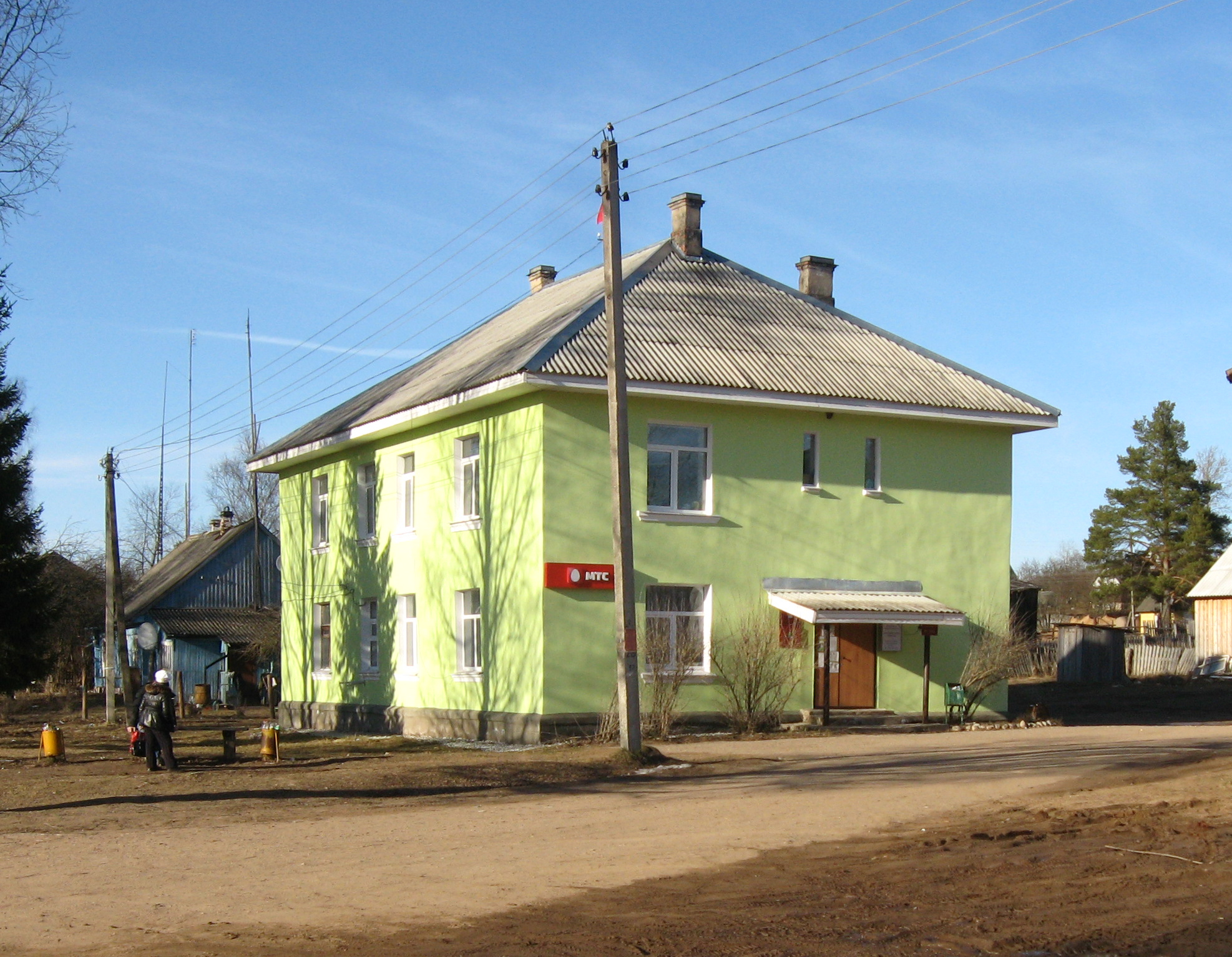 Здание различных служб, в том числе администрации сельского поселения "Лядская волость".